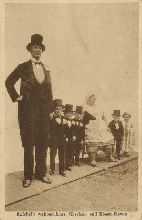 Krichels weltberühmte Märchen und Riesen-Revue